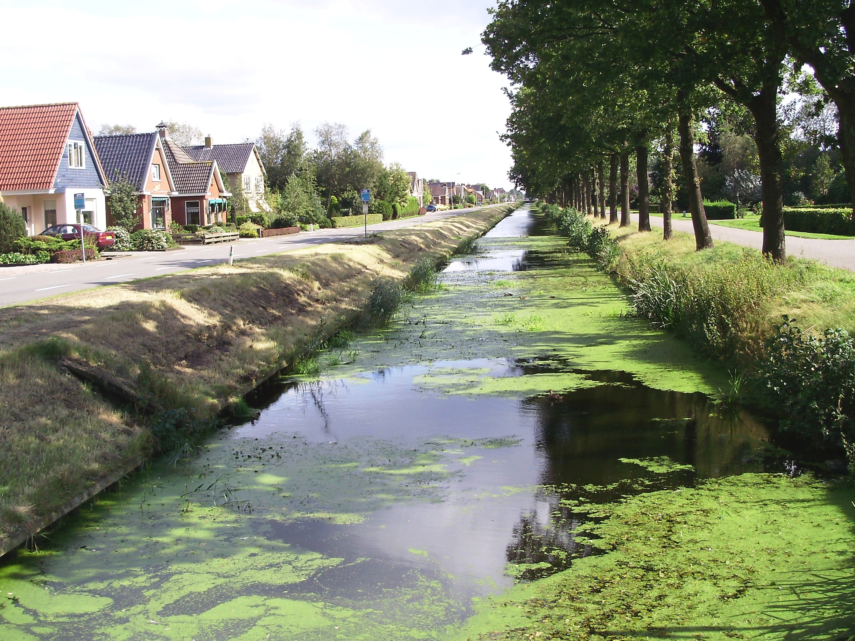 De Haulerwijkstervaart in Haulerwijk, provincie Friesland